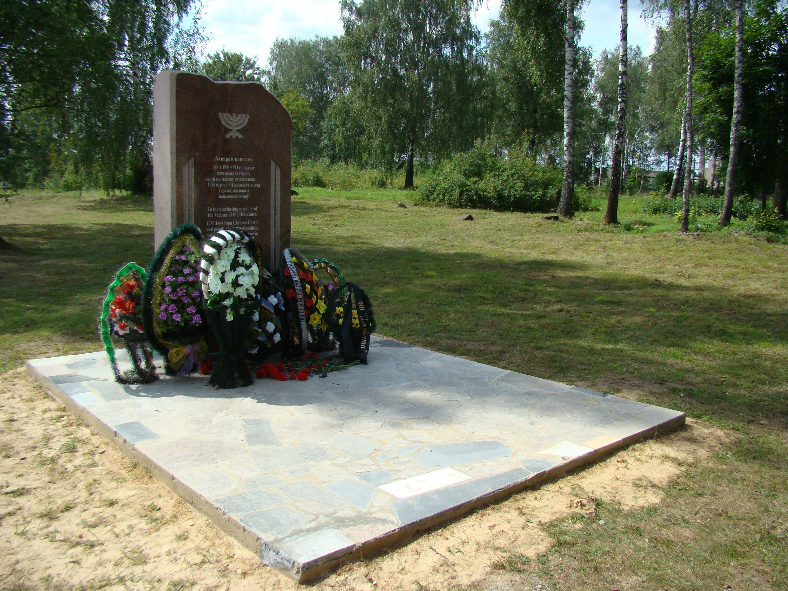 Памятник на месте массового убийства 1750 евреев Червеньского гетто в 1941-1943 годах на еврейском кладбище города (напротив дома № 68 по улице Минской). Установлен в 2012 году.